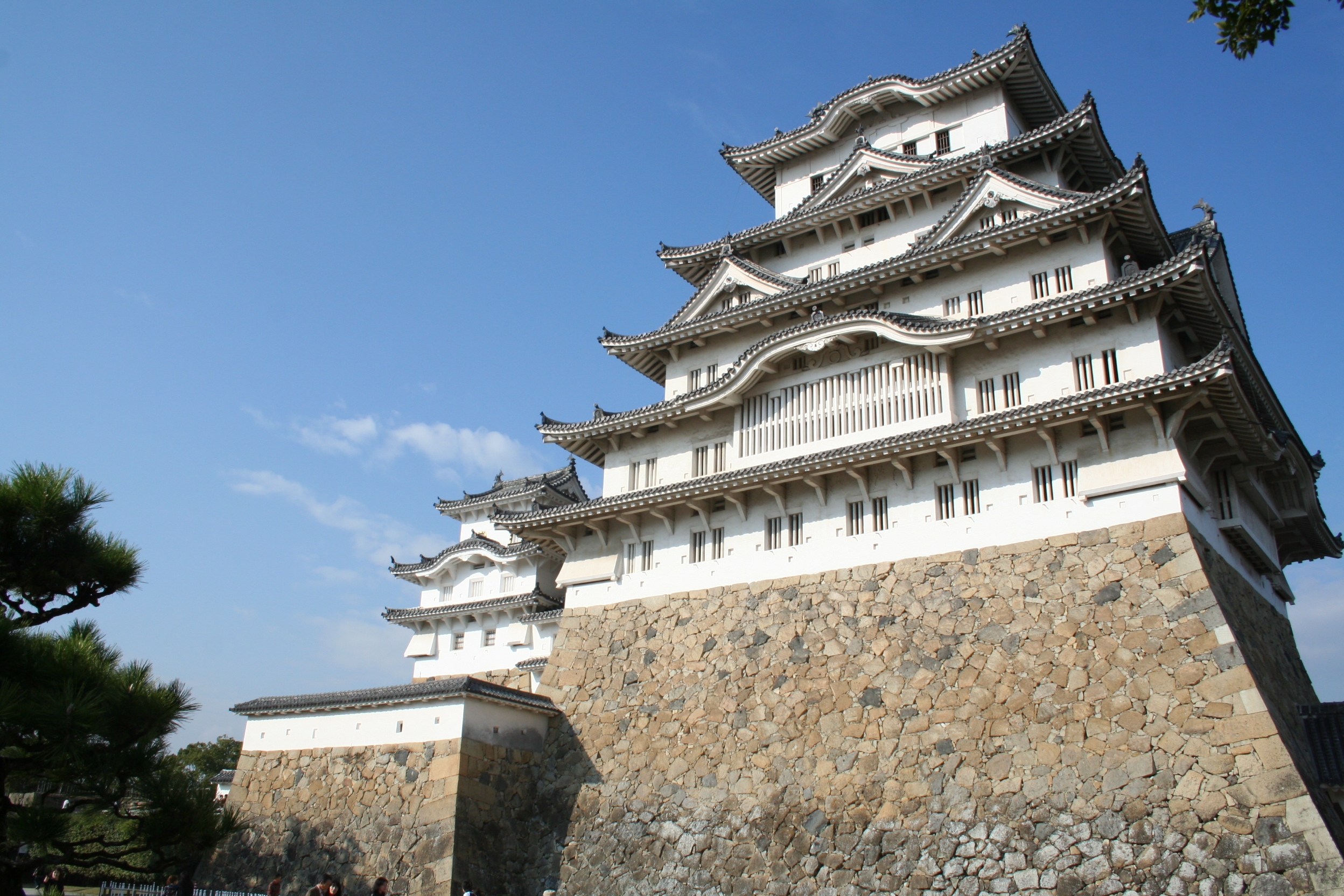 2009年秋の姫路城。 備前丸から見た天守閣。